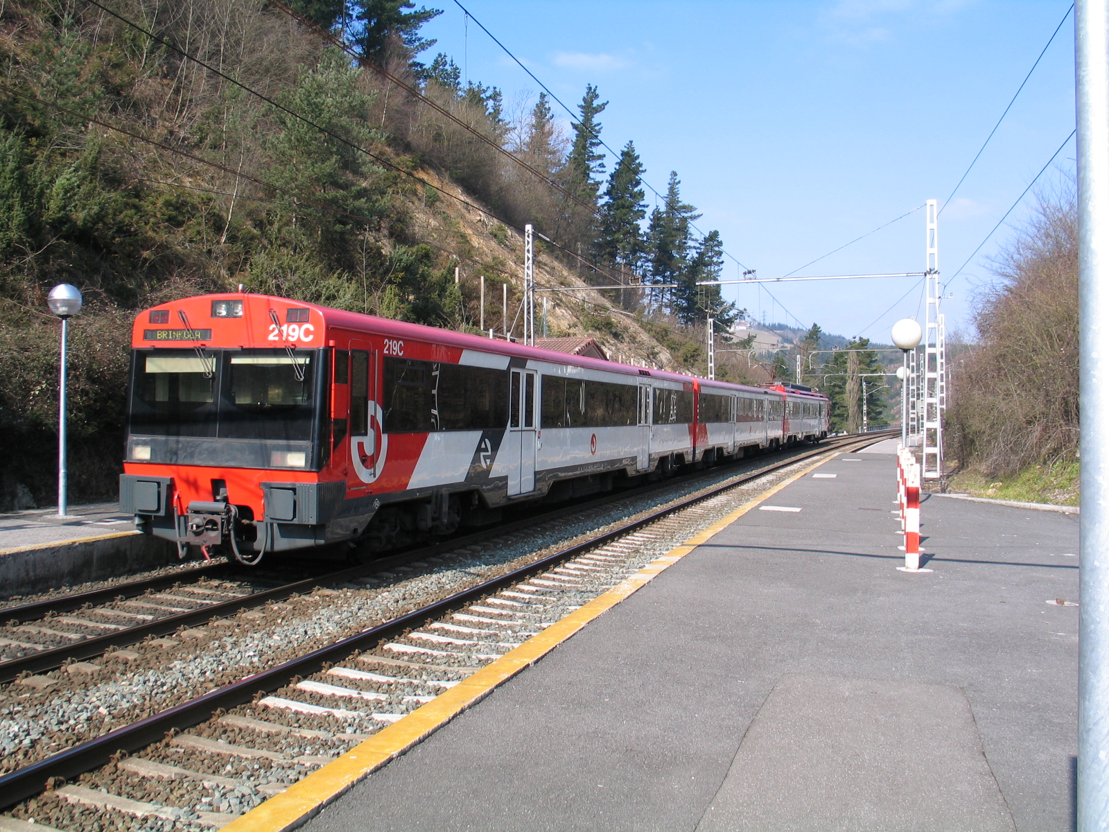 Renfe Cercanias en Ormáiztegui